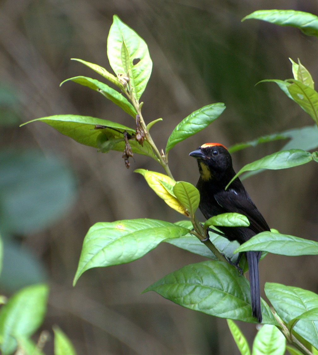 Rodovia Empei Hiraide SP-139, próximo à cidade de Registro-SP